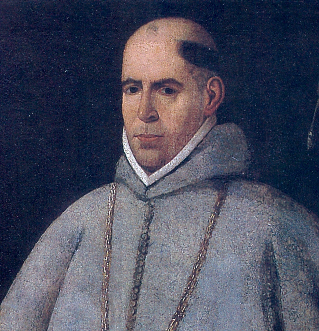 Feliciano de Vega y Padilla, rector sanmarquino, obispo de Popayán y La Paz y arzobispo de México